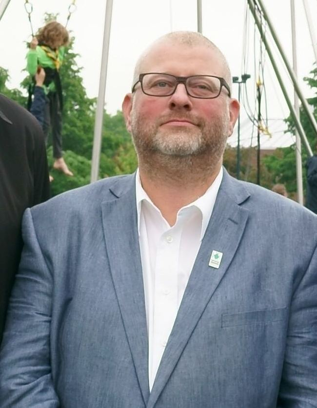 Joyeuse Fête nationale du Québec de Saint-Augustin-de-Desmaures avec Joël Godin, Gérard Deltell, Pierre Paul-Hus and Alupa Clarke! Happy Fête nationale du Québec from Saint-Augustin-de-Desmaures with Joël Godin, Gérard Deltell, Pierre Paul-Hus et Alupa Clarke!